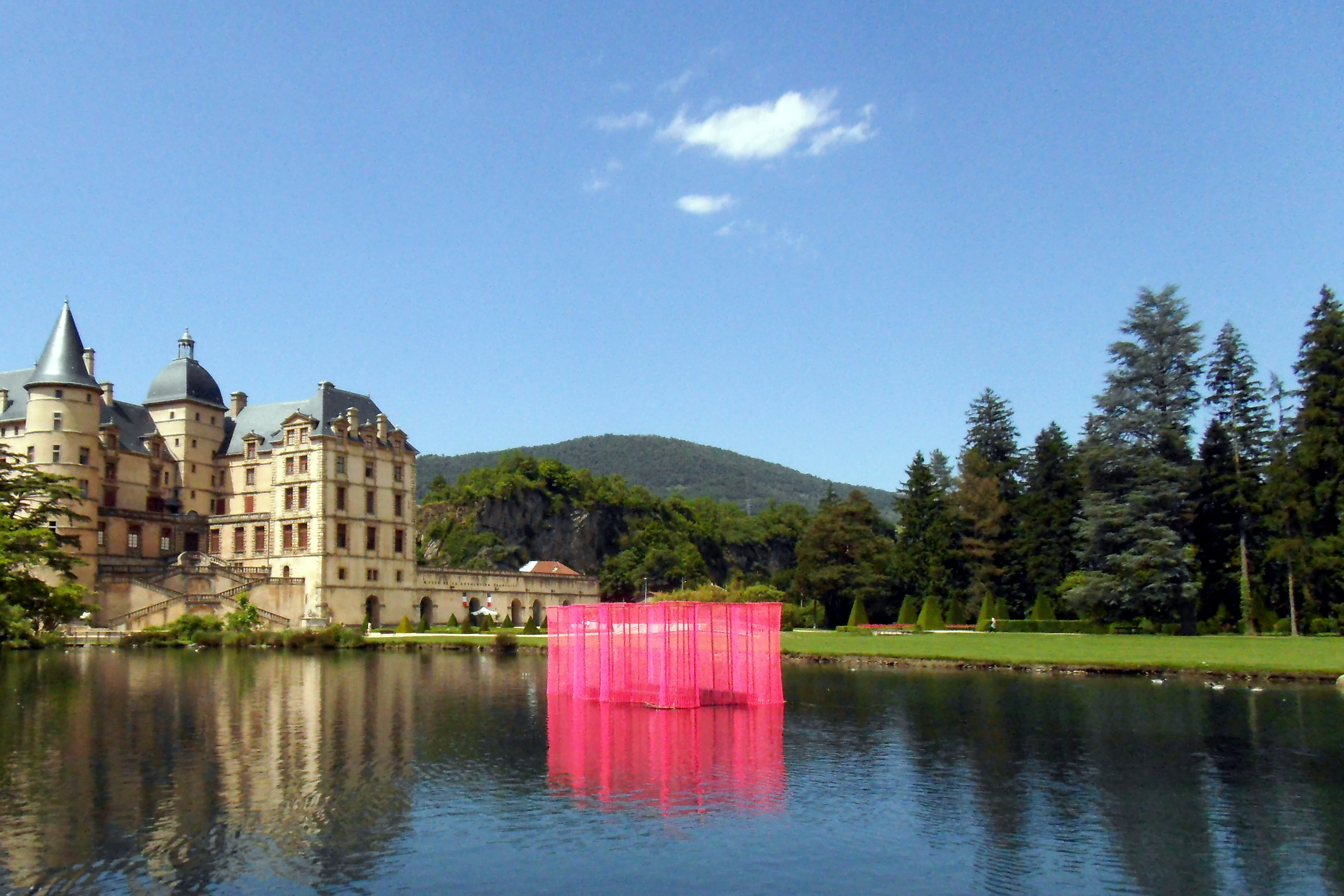 Vue de l'installation Rose Palace sur le canal